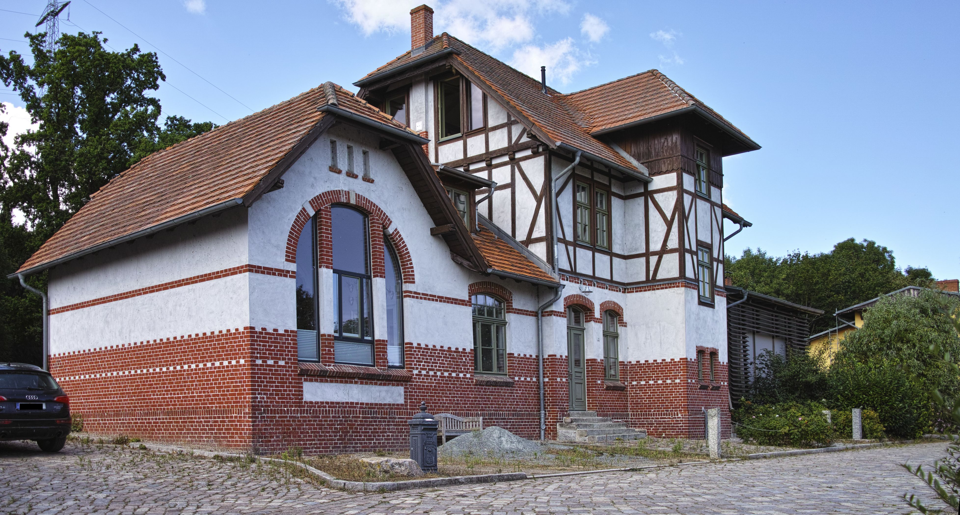 Ehemaliger Bahnhof in Karnin Straßenansicht.